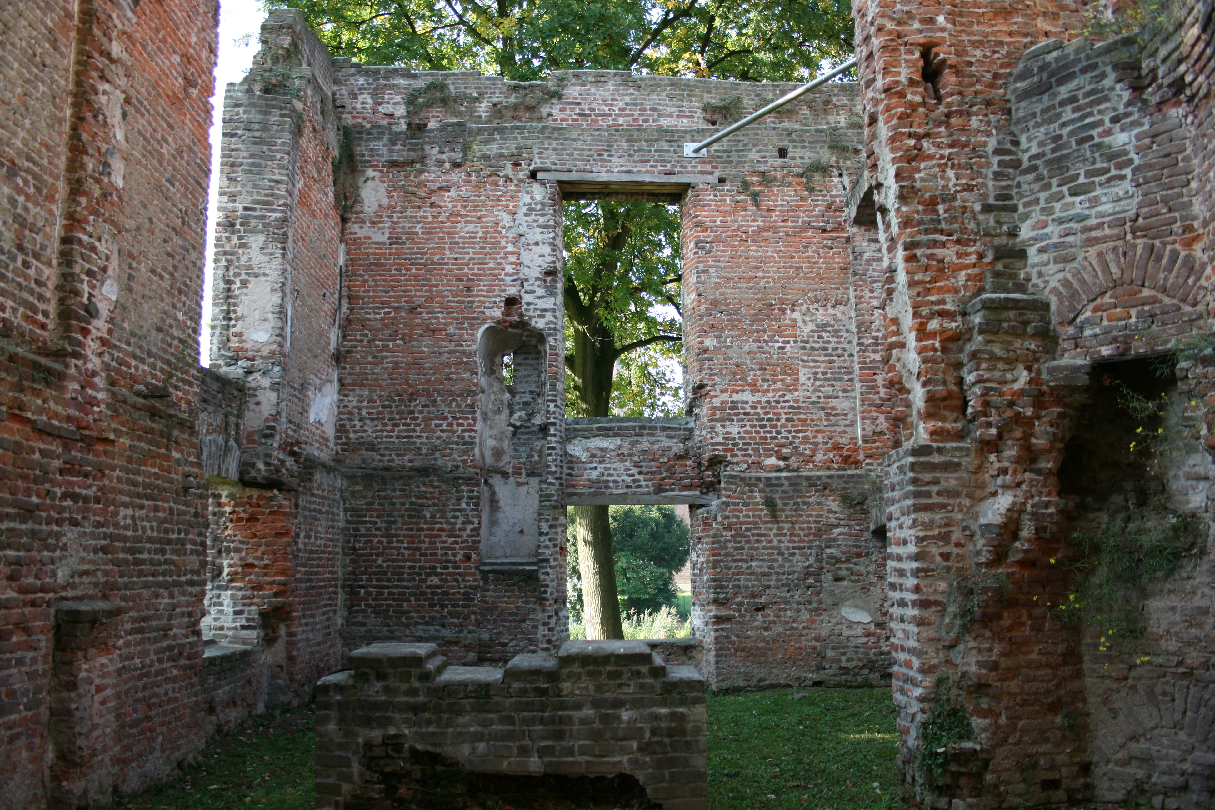 Haus Hertefeld in Weeze